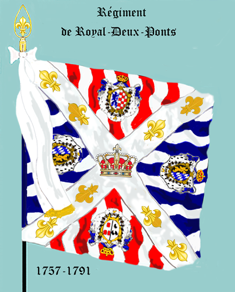 Ordonnanzfahne eines königlich französischen Infanterie-Regiments. (Fremdenregiment aus Deutschland)- Entnommen und überarbeitet aus: „LES UNIFORMES ET LES DRAPEAUX DE L'ARMÉE DU ROI“ Marseille 1899. (Drapeau d'Ordonnance d'un régiment française d'infanterie royale. (Régiment etrangéré allemande.)